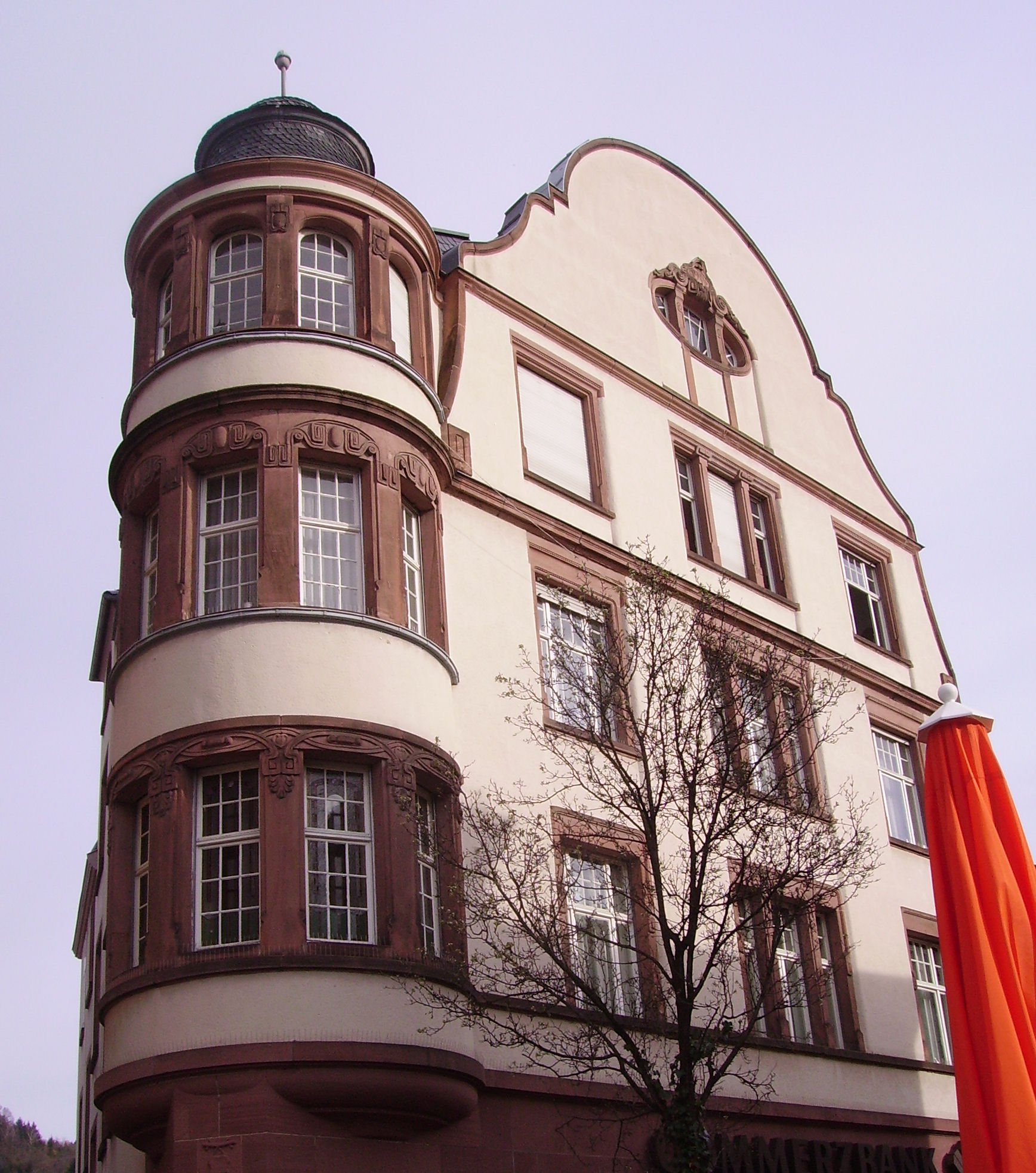 view of Weinheim, Germany